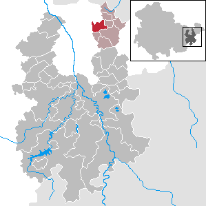 Brahmenau in Thuringia - District Greiz